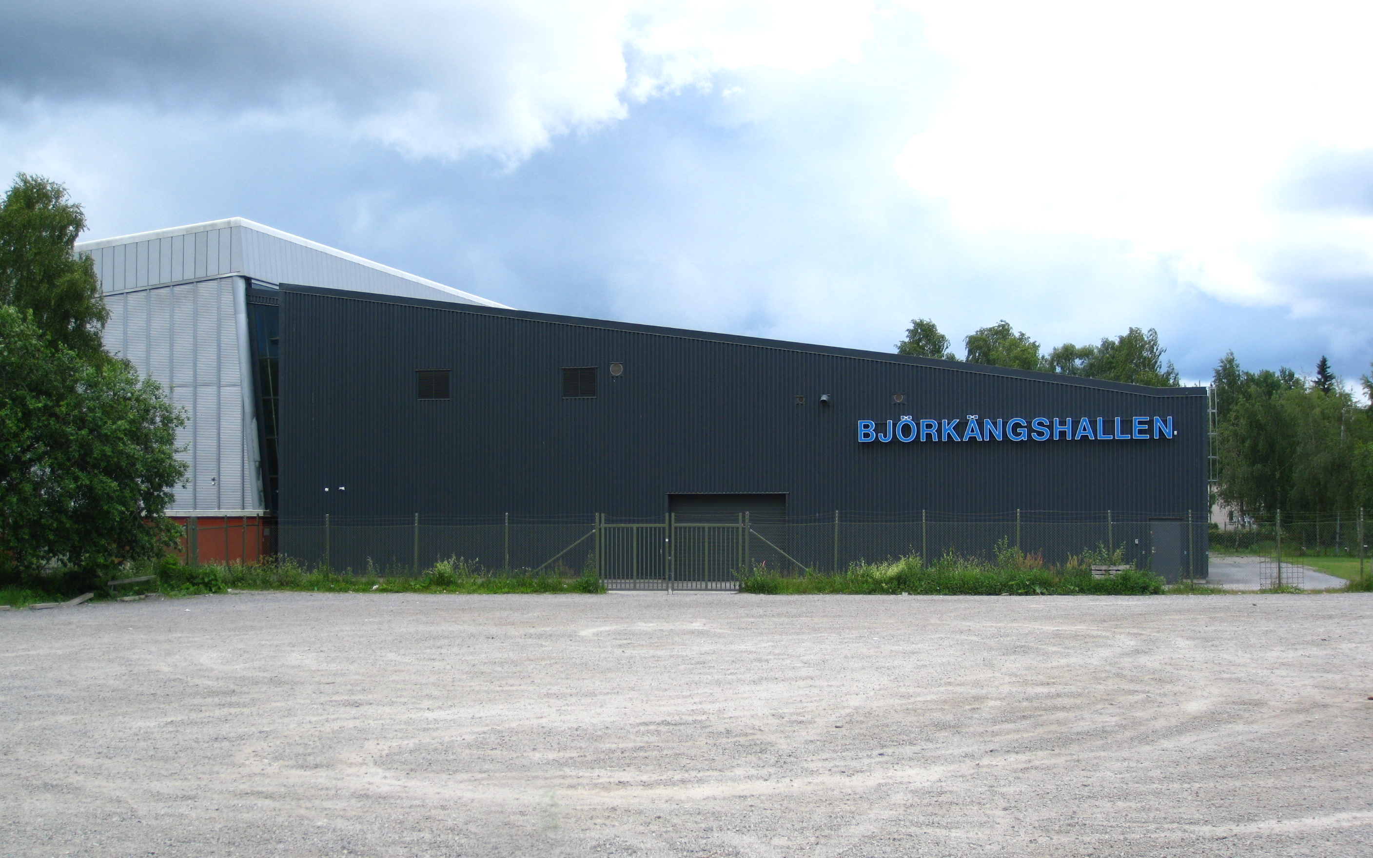 Björkängshallen, Huddinge, södra Stockholm